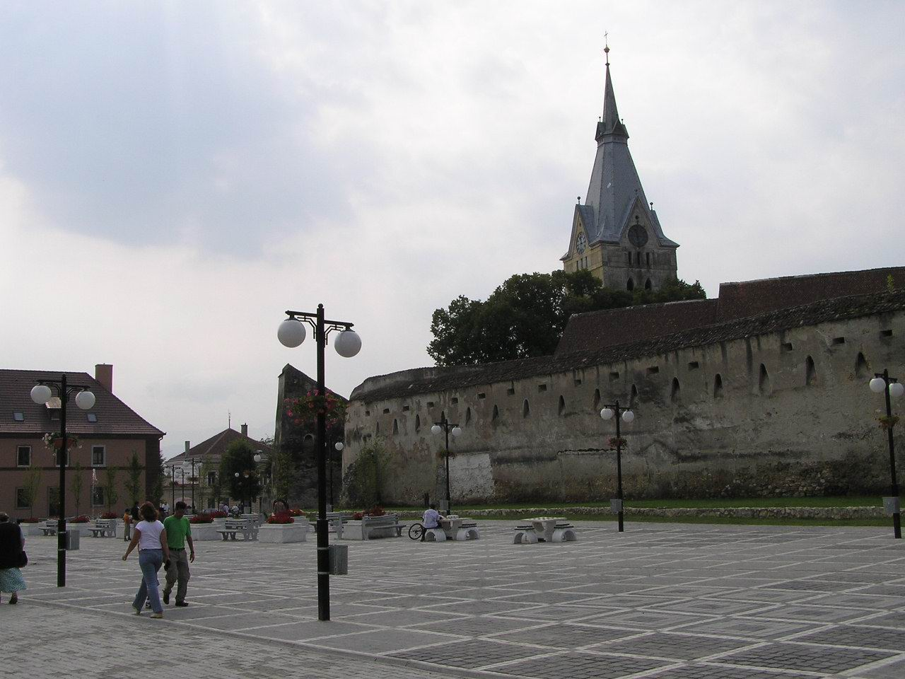 Neue Promenade, Ringmauer der Kirchenburg mit dem Böttcher- und Glockenturm von Codlea (Zeiden), RumänienRomână: Noua promenadă, zidurile cetăţii cu Turnul-Böttcher şi Turnul-clopotniţă al Bisericii fortificate din Codlea (Zeiden), România